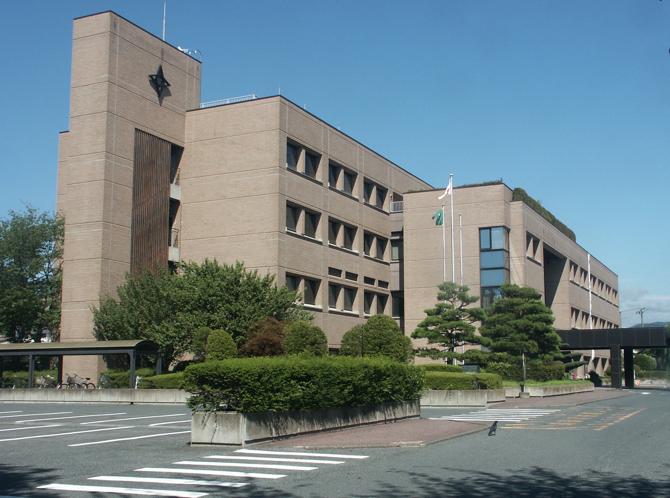 盛岡市役所都南総合支所（旧都南村役場）庁舎